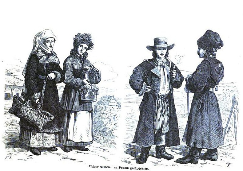 Подолье галицкое, из книги «Образы Червоной Руси»